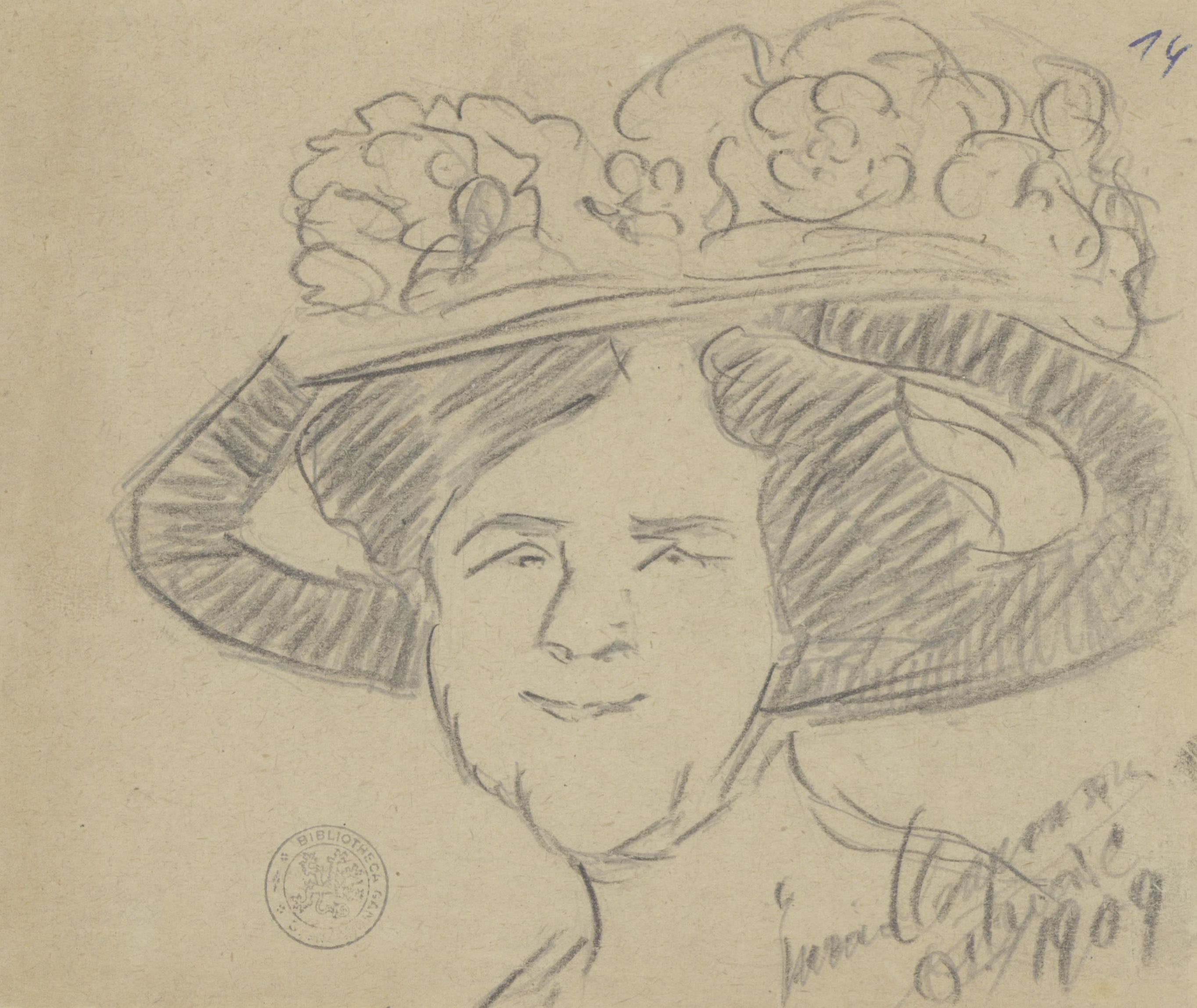 Portret van de Duitse sopraan Frieda Hempel (1885-1955) uit verzamelband karikaturen getekend door Enrico Caruso, 1906 & 1909, Universiteitsbibliotheek Gent